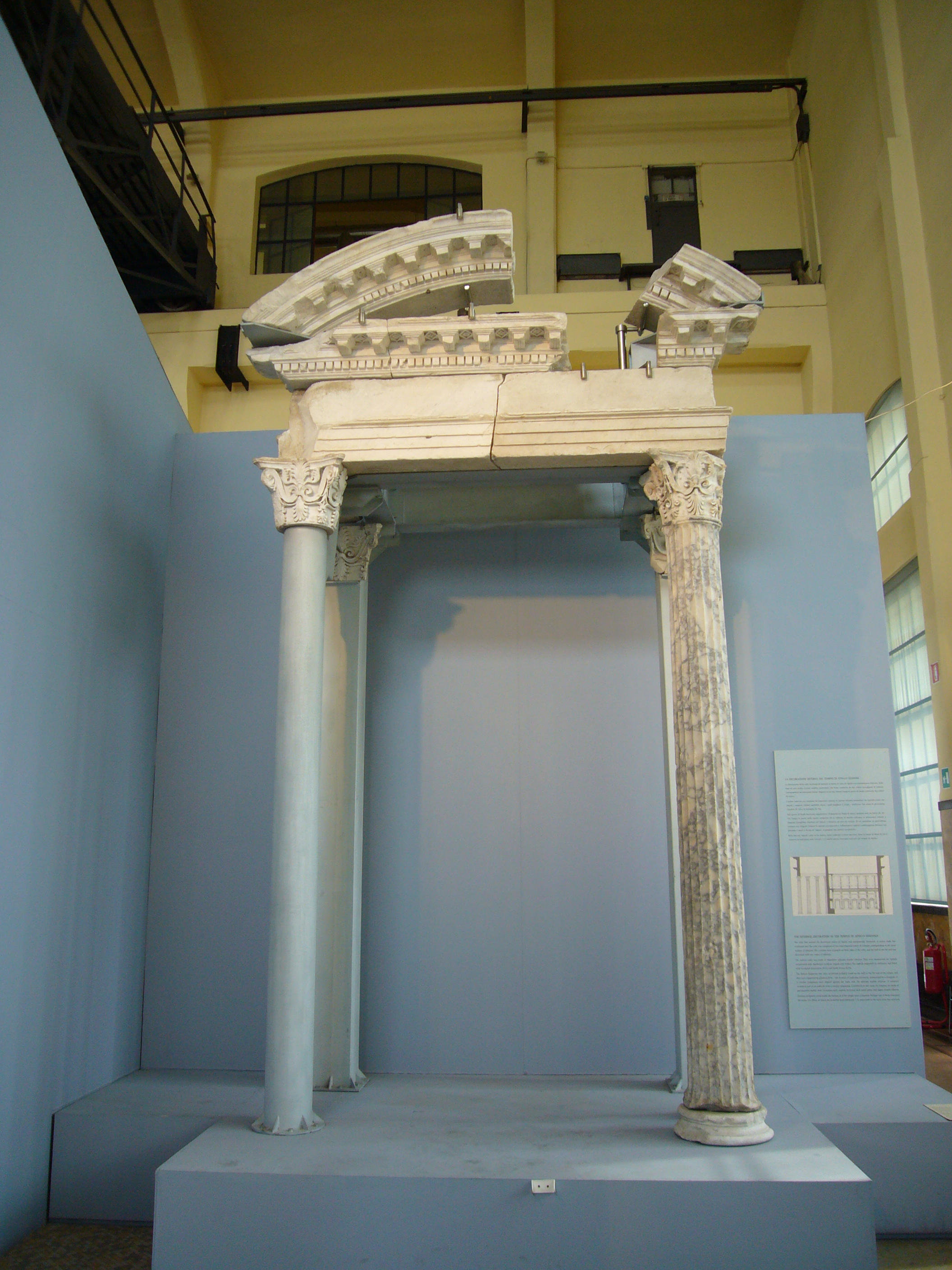 Centrale Montemartini a Roma: edicola dal Tempio di Apollo Sosiano.